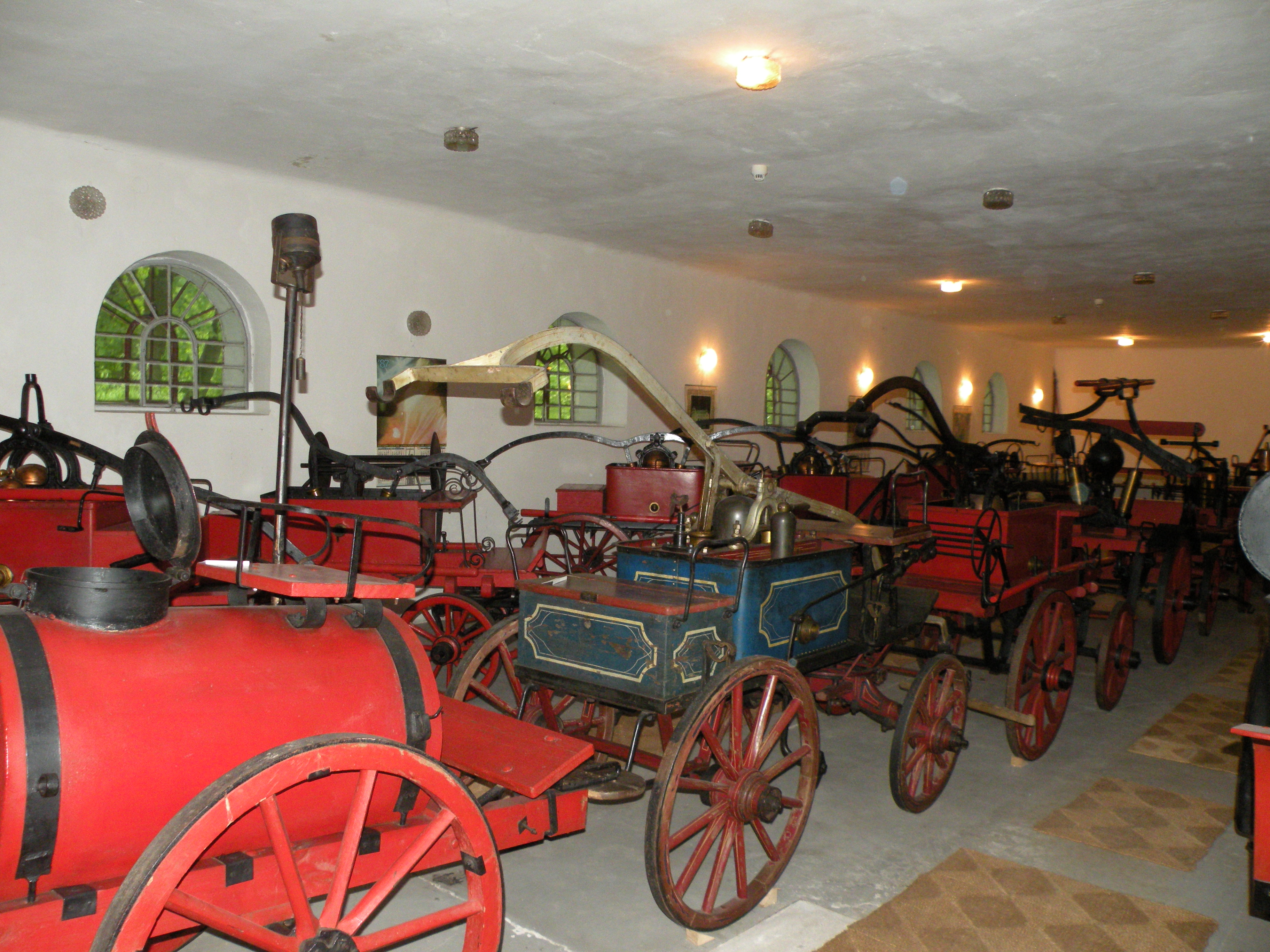 Zbiory Muzeum Pożarnictwa w Przeworsku